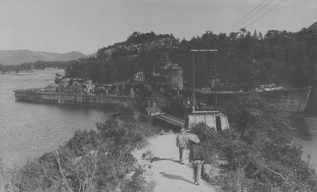 戦後、佐世保相ノ浦港で撮影された凉月